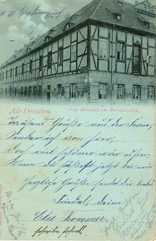 Der Malersaal um 1900, kurz vor dem Abriss (Ansichtskarte)